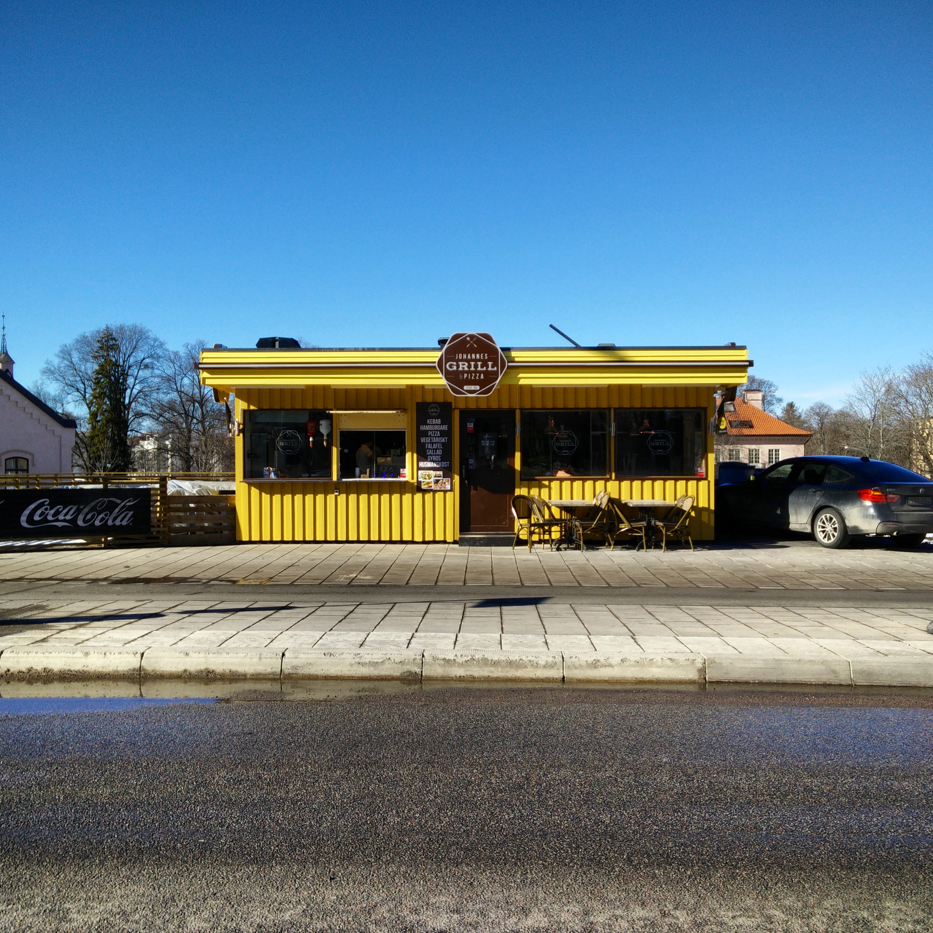 Johannesgrillen i Uppsala, efter att den renoverats och fått helt nytt utseende.